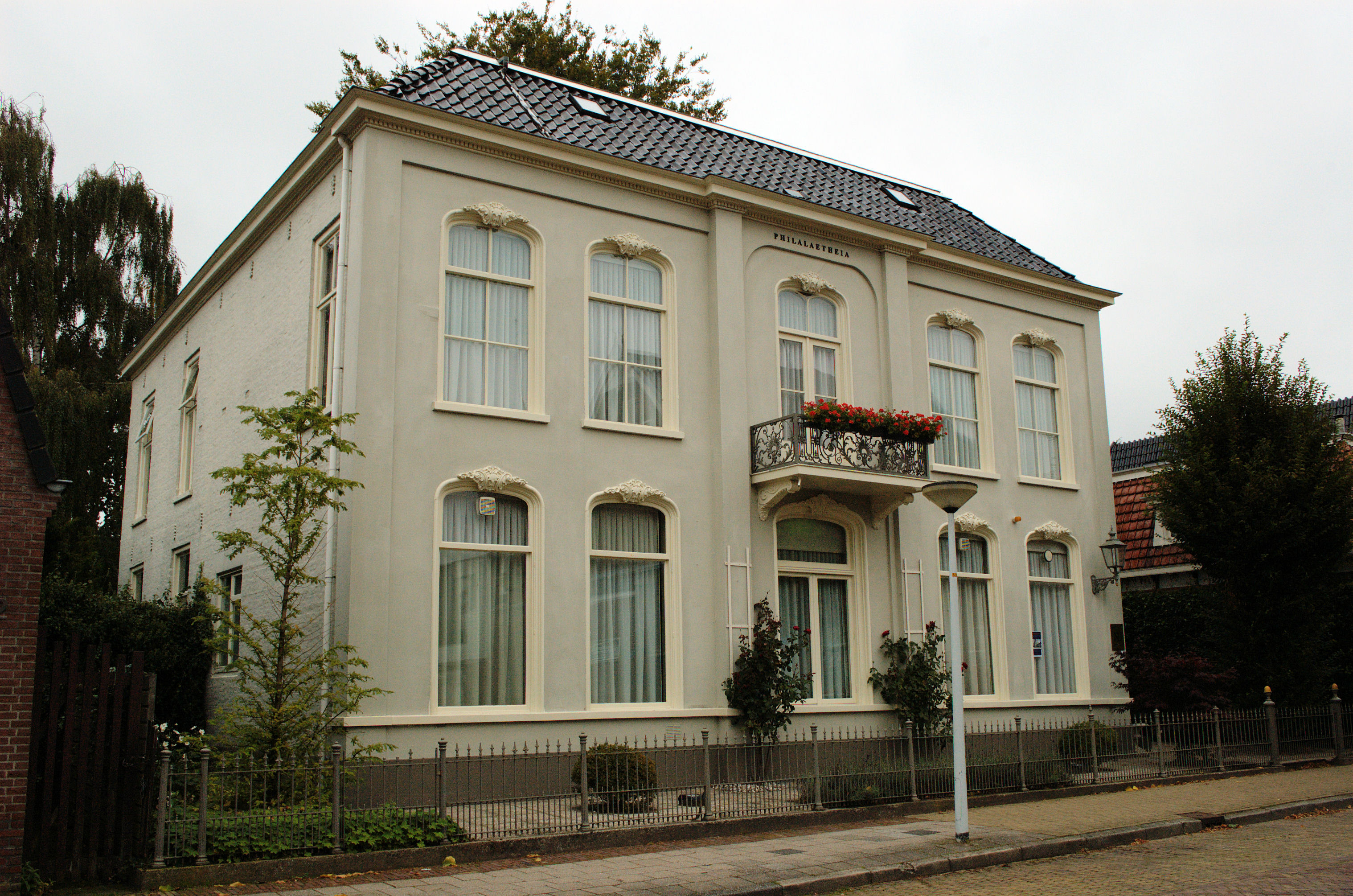 Woonhuis in 1866 is gebouwd in opdracht van Mr. Adrianus Eldering Ferf voor zijn zoon Mr. Horatius Ferf. Tegenwoordig notariskantoor. Rijksmonument 512575.